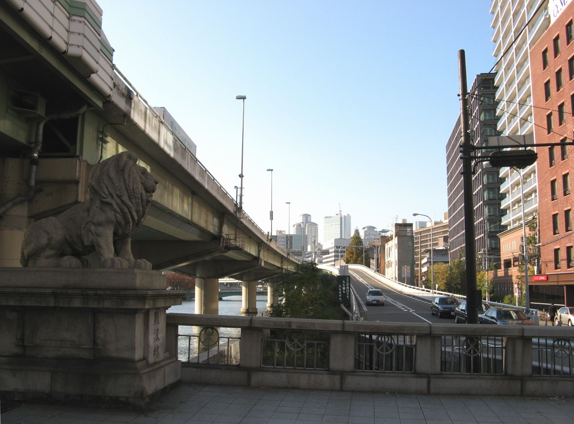 阪神高速ja:北浜出口（正面を下りてくる道路） 難波橋上から西望